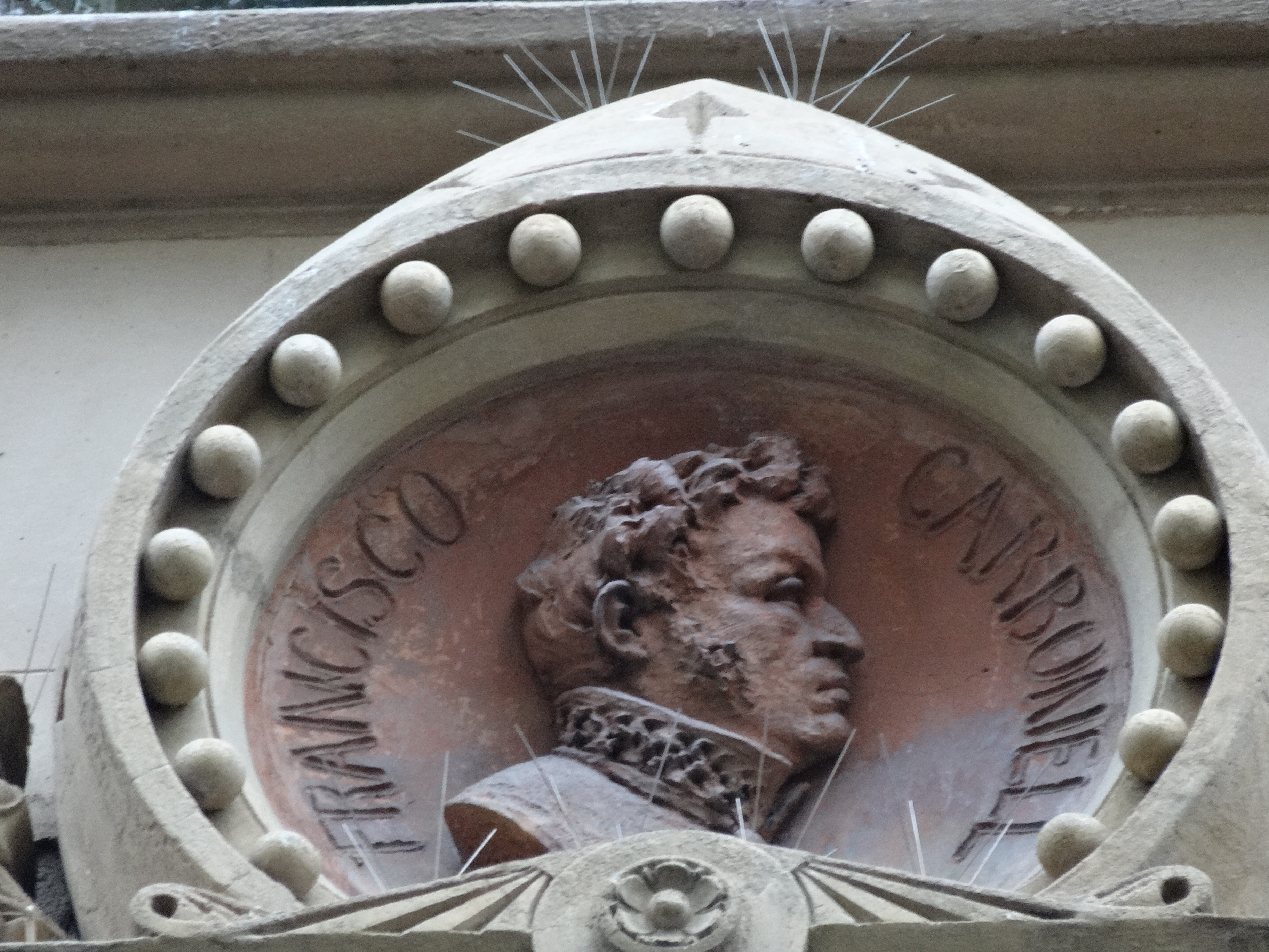 Escultures a la façana de la Reial Acadèmia de les Ciències i les Arts (Barcelona). Medalló amb Francesc Carbonell i Bravo, químic farmacèutic i mineralogista.